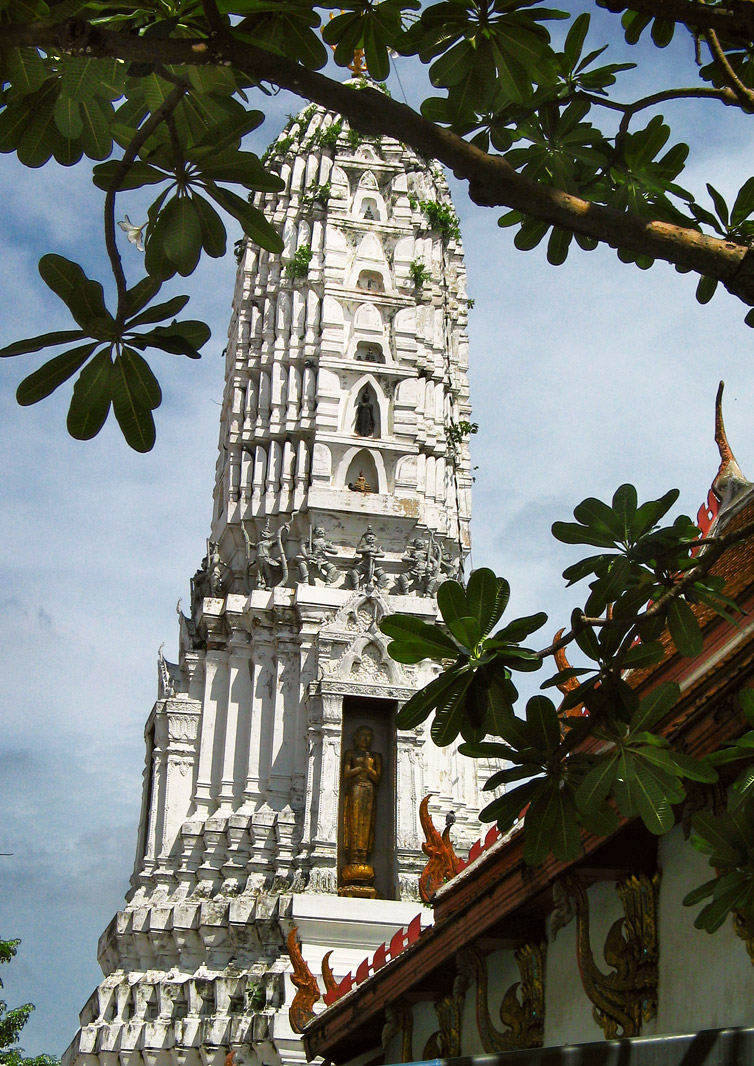 Prang in Wat Rakhang, Bangkok Noi district, Bangkok, Thailand